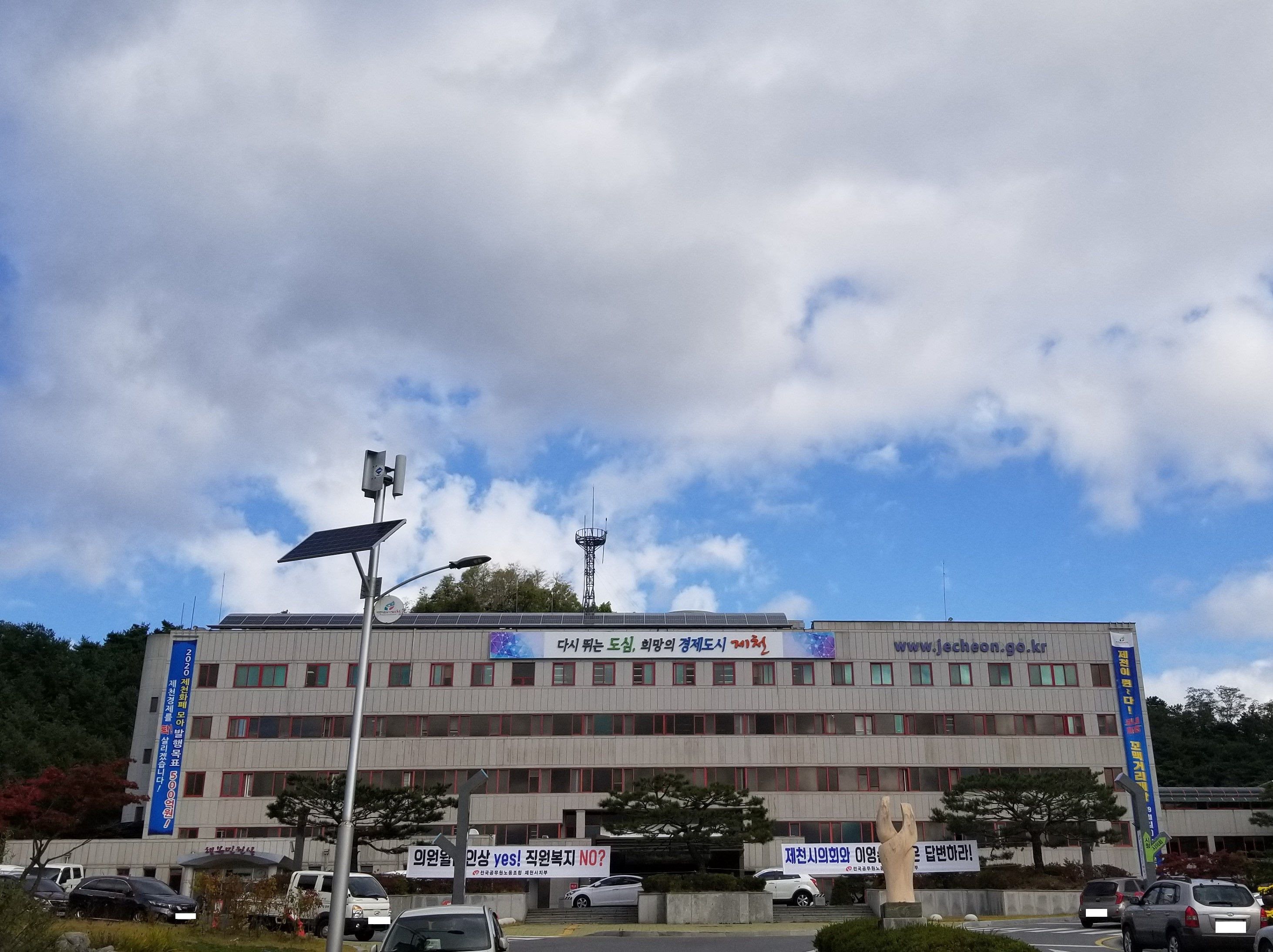 충청북도 제천시에 있는 제천시청